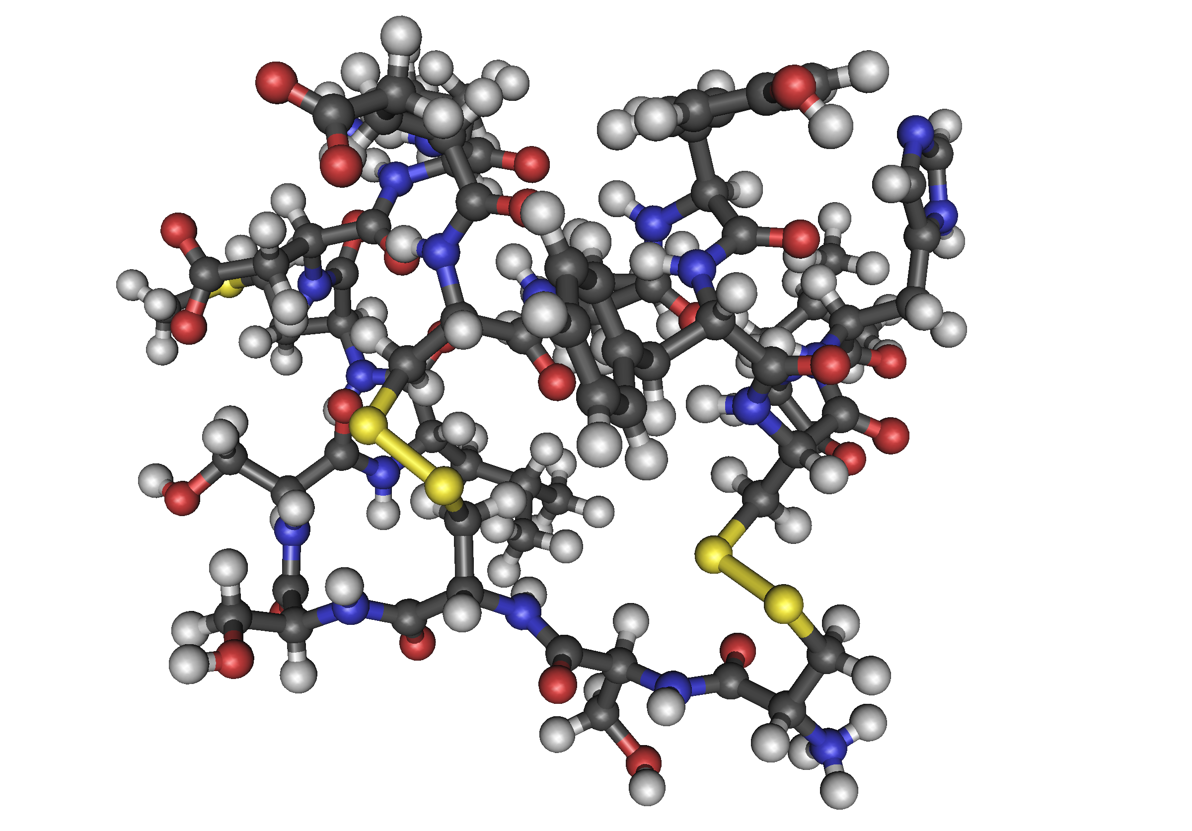 1EDN_human_endothelin